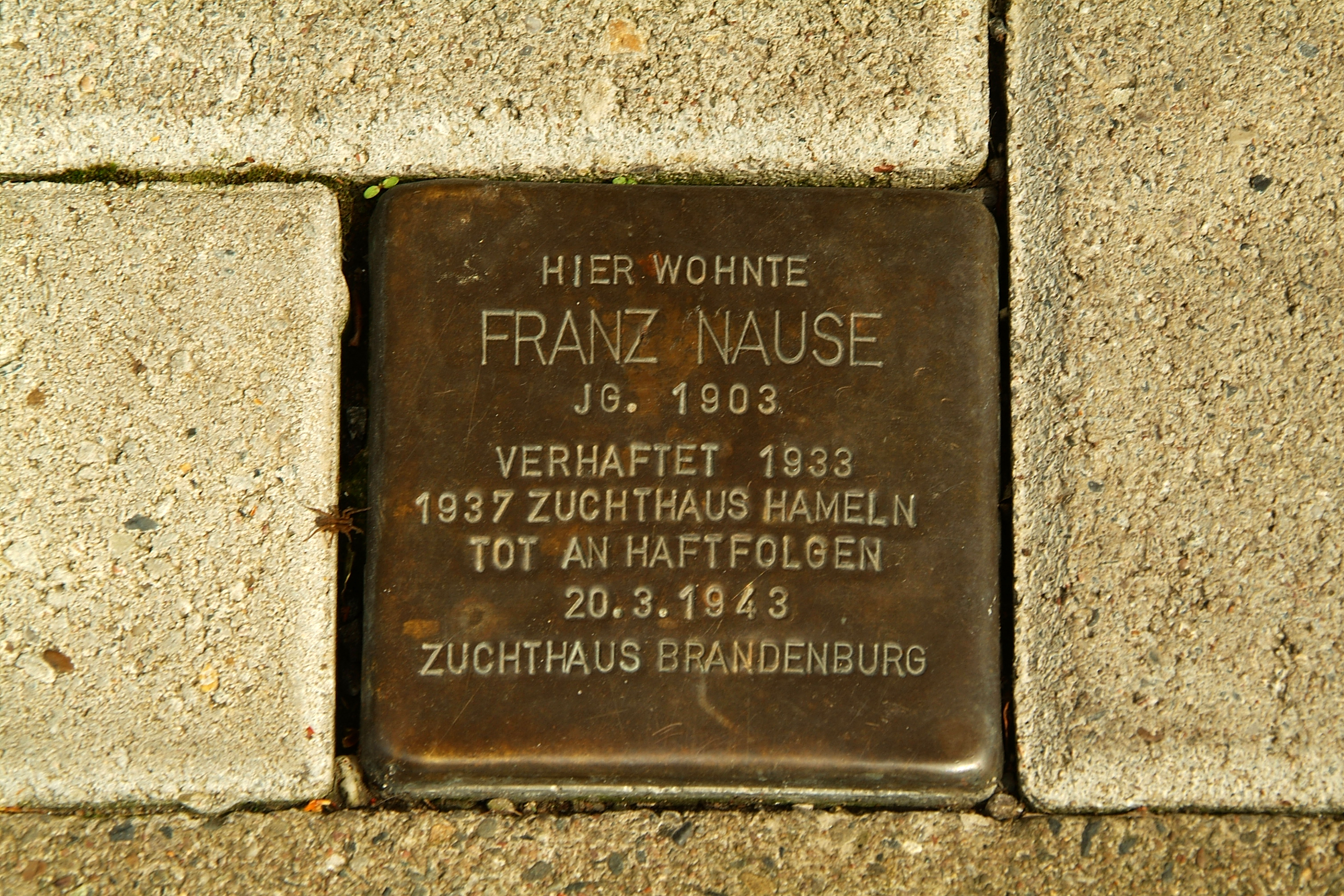 Stolperstein für Franz Nause vor der Kesselstraße 19 in Hannover-Limmer: "Hier wohnte Franz Nause, Jg. 1903, verhaftet 1933, 1937 Zuchthaus Hameln, tot an Haftfolgen, 20. 3. 1943, Zuchthaus Brandenburg.